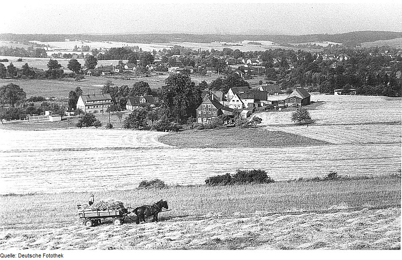 Original image description from the Deutsche Fotothek Ebersbach/Sachsen-Spreedorf. Blick von der Felsenmühle